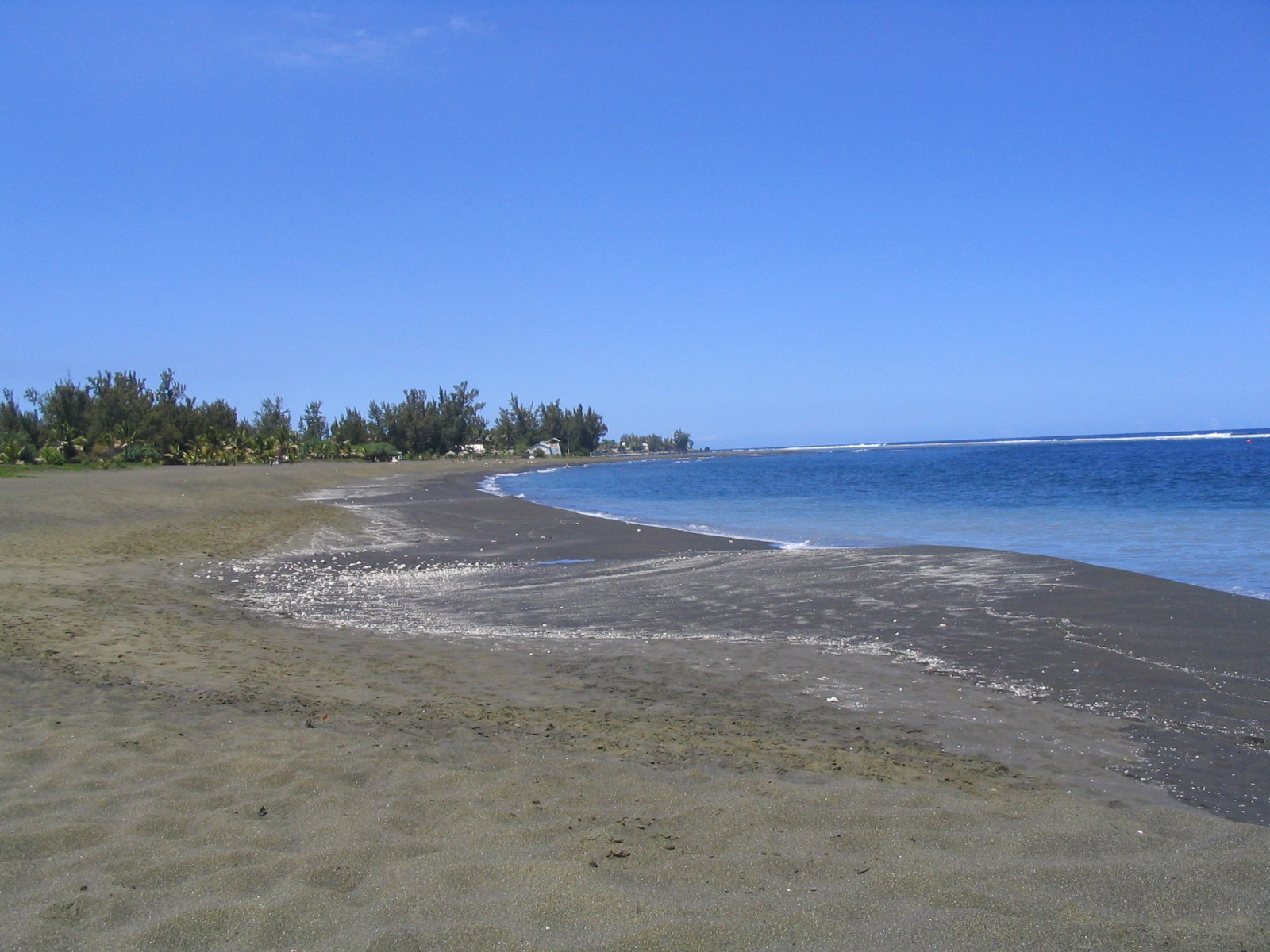 Photo de la plage d'Étang Salé à la Réunion